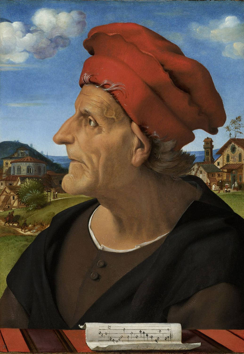 Pendant of File:Piero di Cosimo 047.jpg